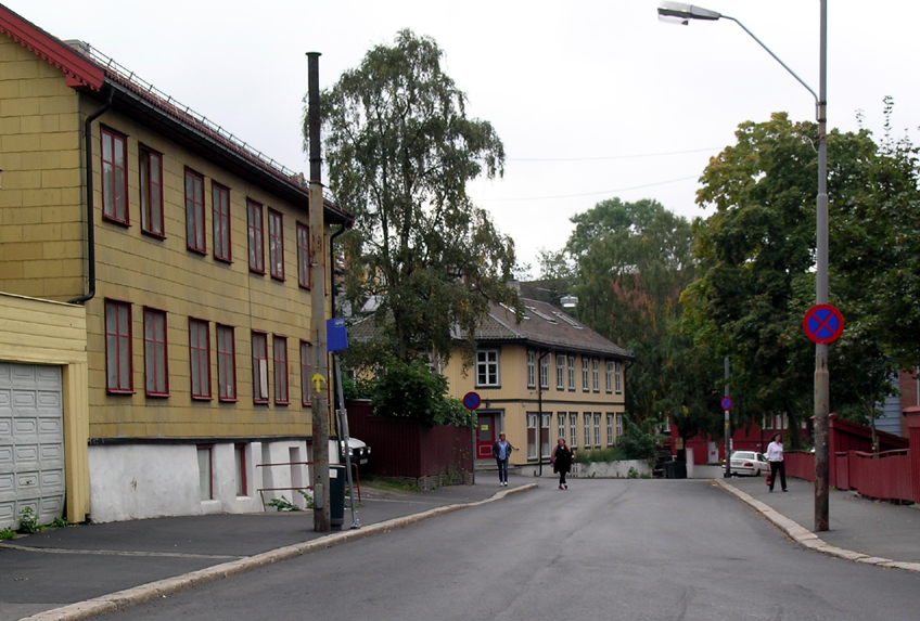 Brinken, Oslo.